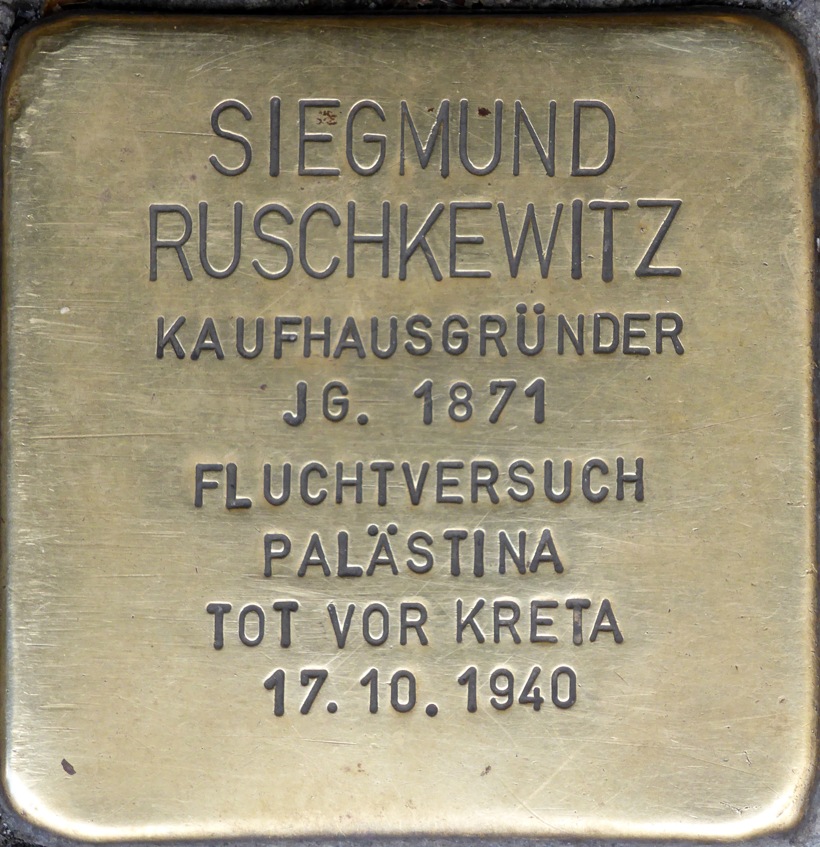 Stolperstein: Siegmund Ruschkewitz (Schönbornstraße 3), Würzburg.